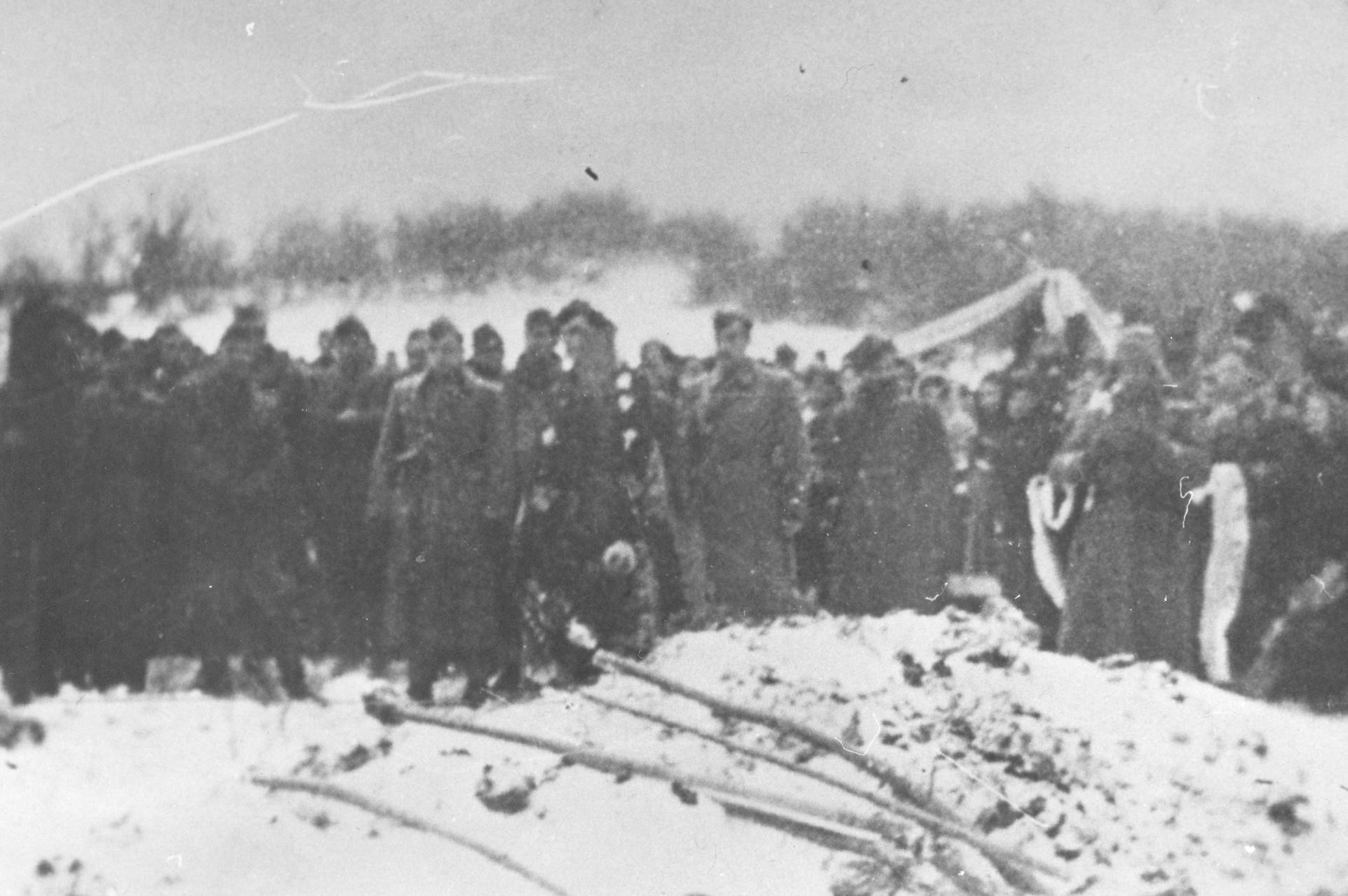 Srpskohrvatski / српскохрватски: Pogreb Milana Stanivukovića - komandanta 12. divizije - i kapetana Marka Klaića, koji su poginuli kod Levanjske Varoši. 1. januar 1945.